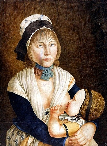 Juliana Blasius (1781-1851), die Braut des Räubers Johannes Bückler-Schinderhannes (+ 1803), gemalt von Karl Matthias Ernst (1758-1830)